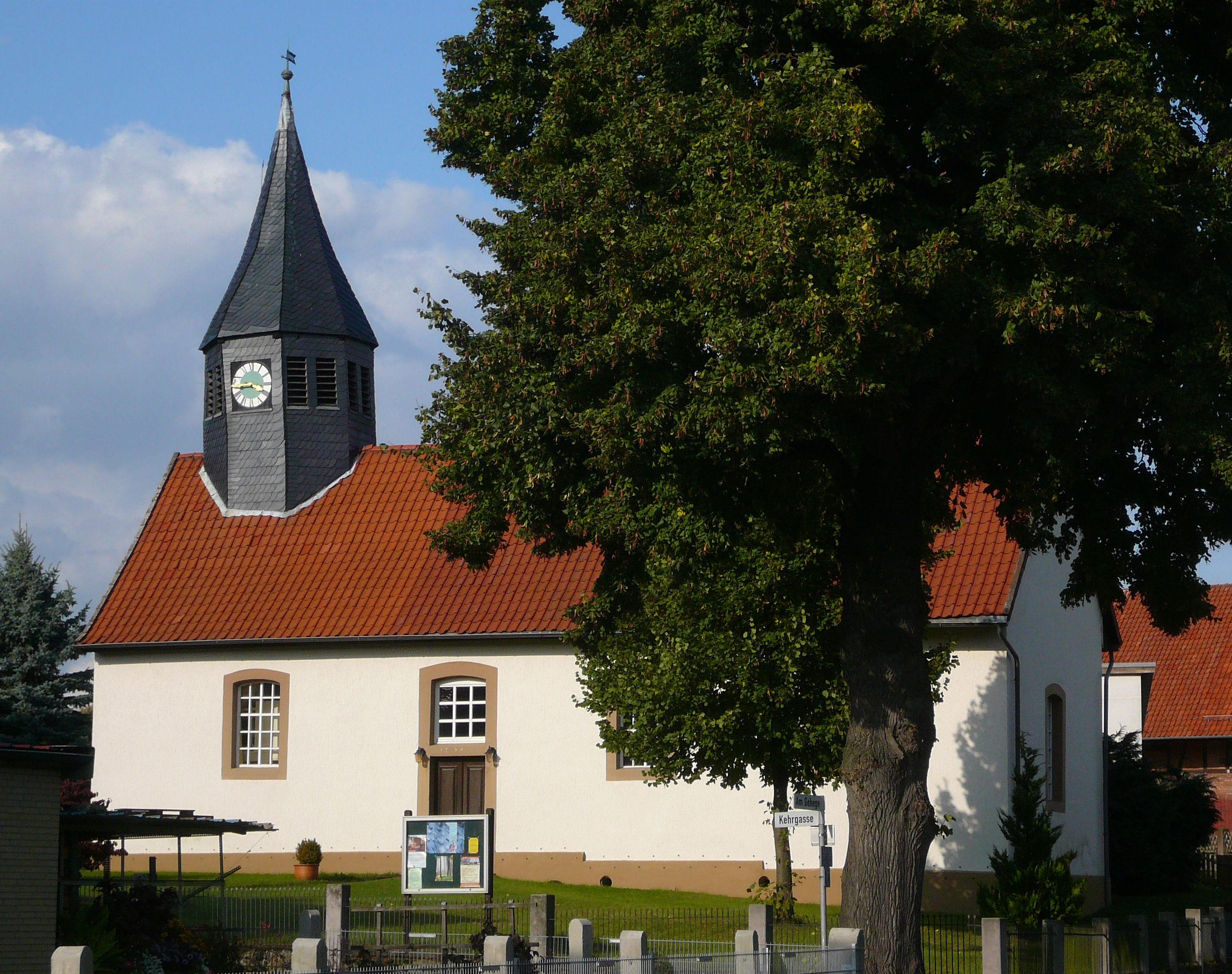 Evangelisch-reformierte Kirche in Oberbillingshausen, Gemeinde Bovenden, Landkreis Göttingen. Erbaut 1739 (Datierung über dem Portal). Seit 2010 Vereinigung mit der ev.-luth. Kirche Unterbillingshausen